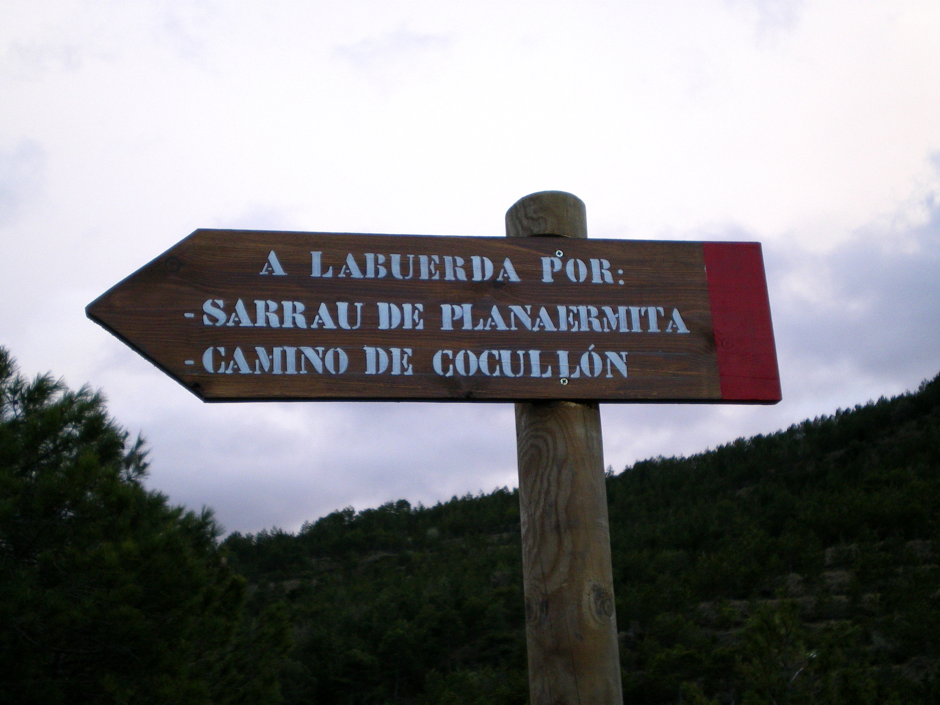 Señalización de caminos convergentes hacia Labuerda, repetando la toponimia original. Aragonés: Senyaliçacion d'os camins converchentes en A Buerda, respetando-ie a toponimia orichinal.